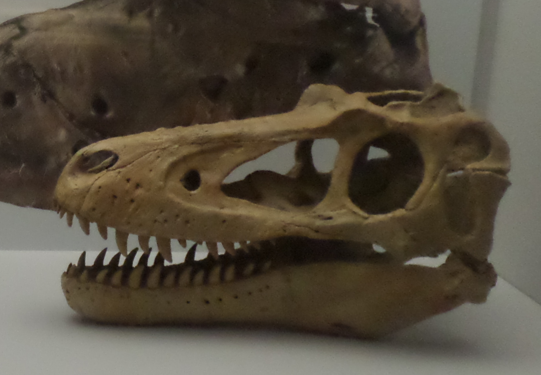 SAMSUNG CAMERA PICTURES